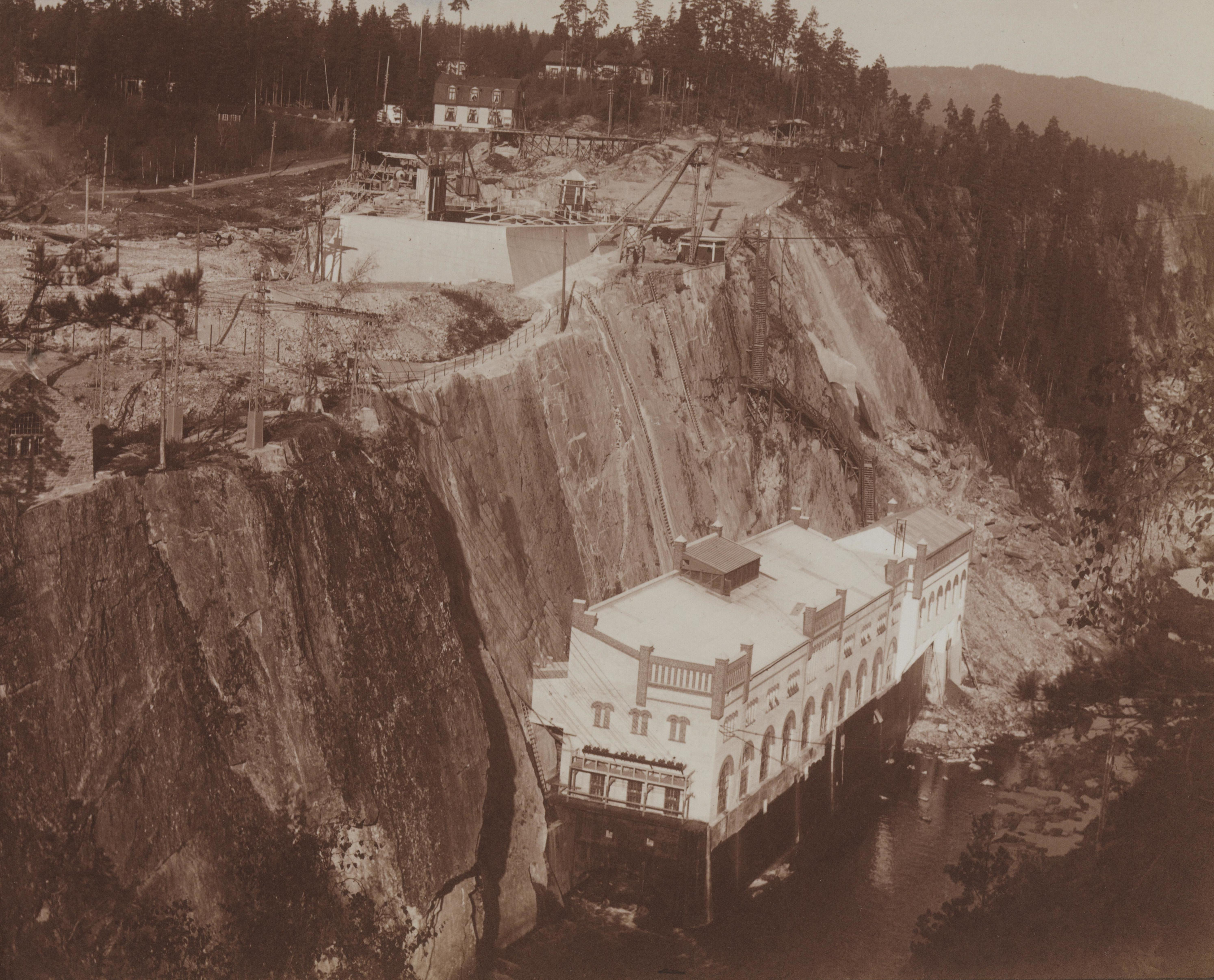 Bildet er hentet fra Nasjonalbibliotekets bildesamling Svelgfoss kraftverk, Notodden, Telemark